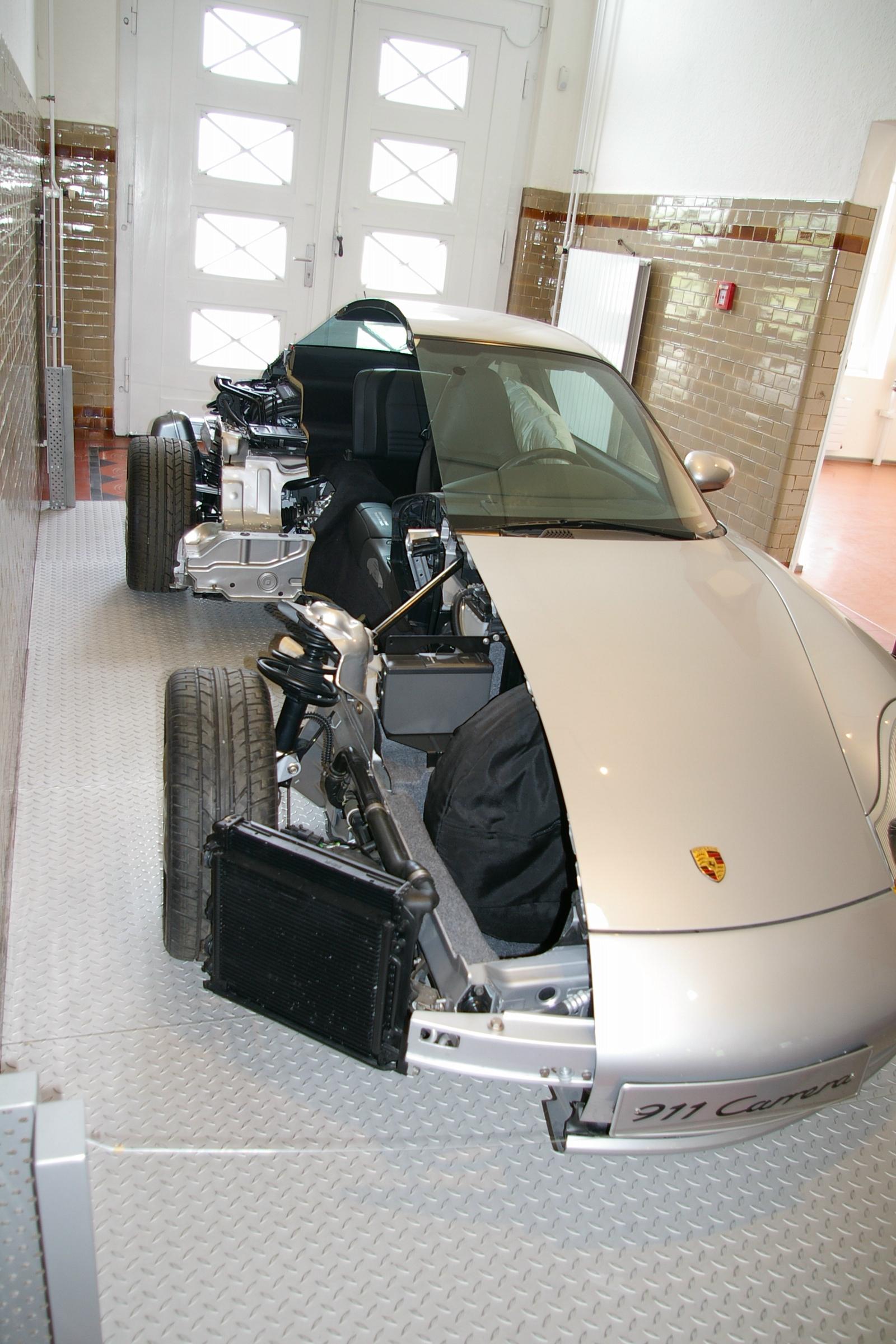 Halbschnittmodell des Porsche 911 (996), z.Zt. (Juni 2006) als Leihgabe der Fa. Porsche im Hoesch-Museum, Dortmund.